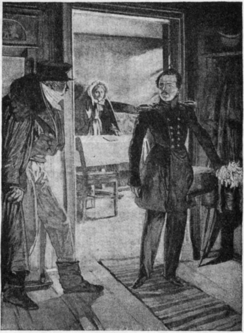 D. Kardovsky. Illustration for the story "The Princess Ligovski" 1914